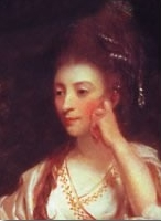 detail